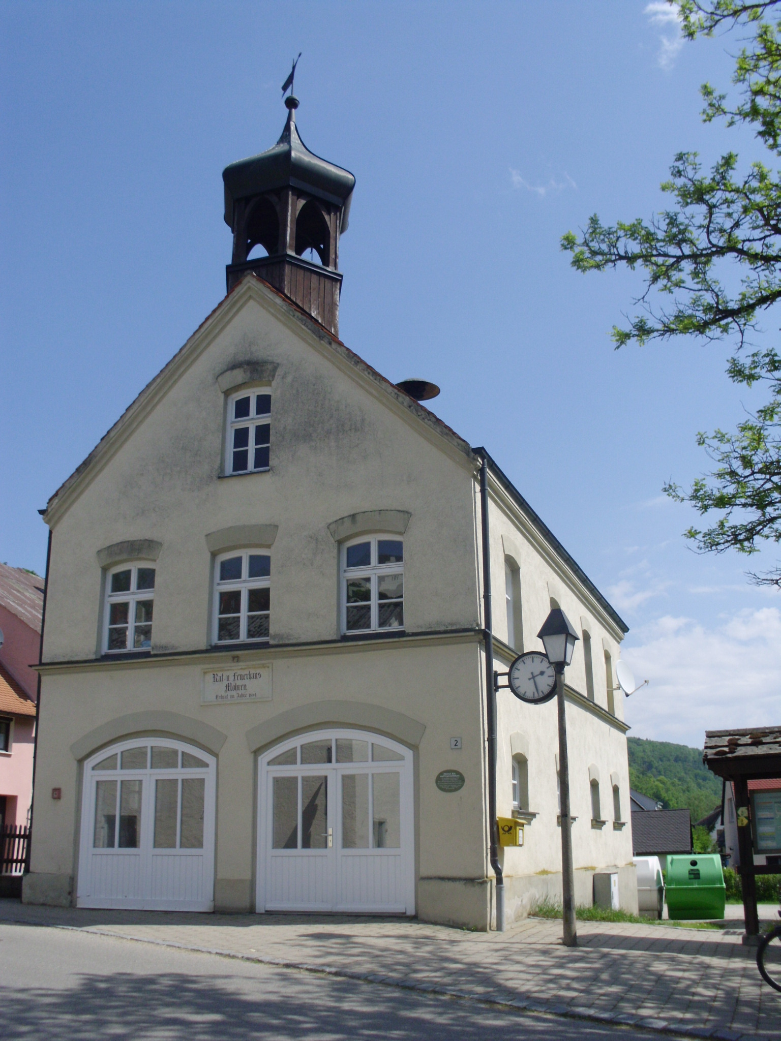 Möhren, Ortsteil von Treuchtlingen, Rathaus und Feuerwehrhaus von 1884